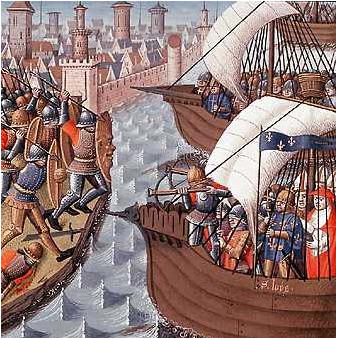 Conquête de Damiette